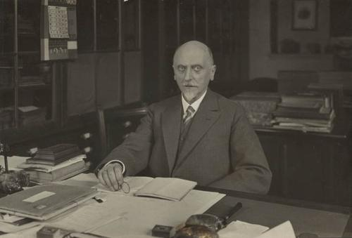 Portretfoto van Hugo Frederik Nierstrasz in zijn werkkamer.